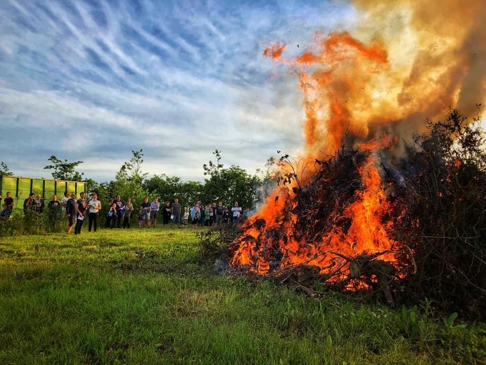 Sankt Hans i Voldby i 2019